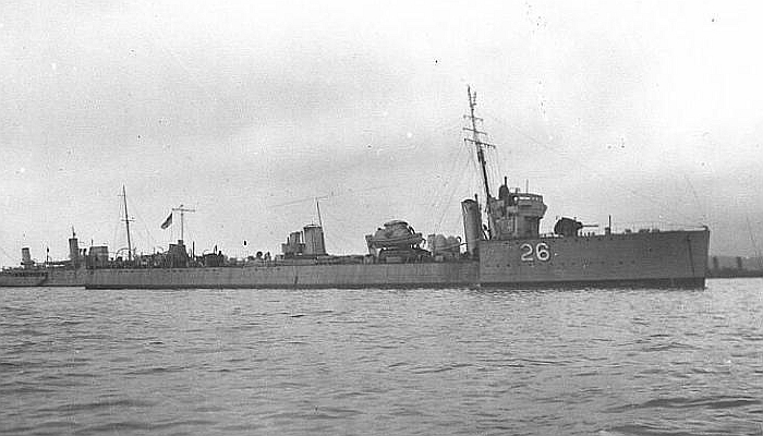 Der britische Zerstörer COCKATRICE der Acasta-Klasse